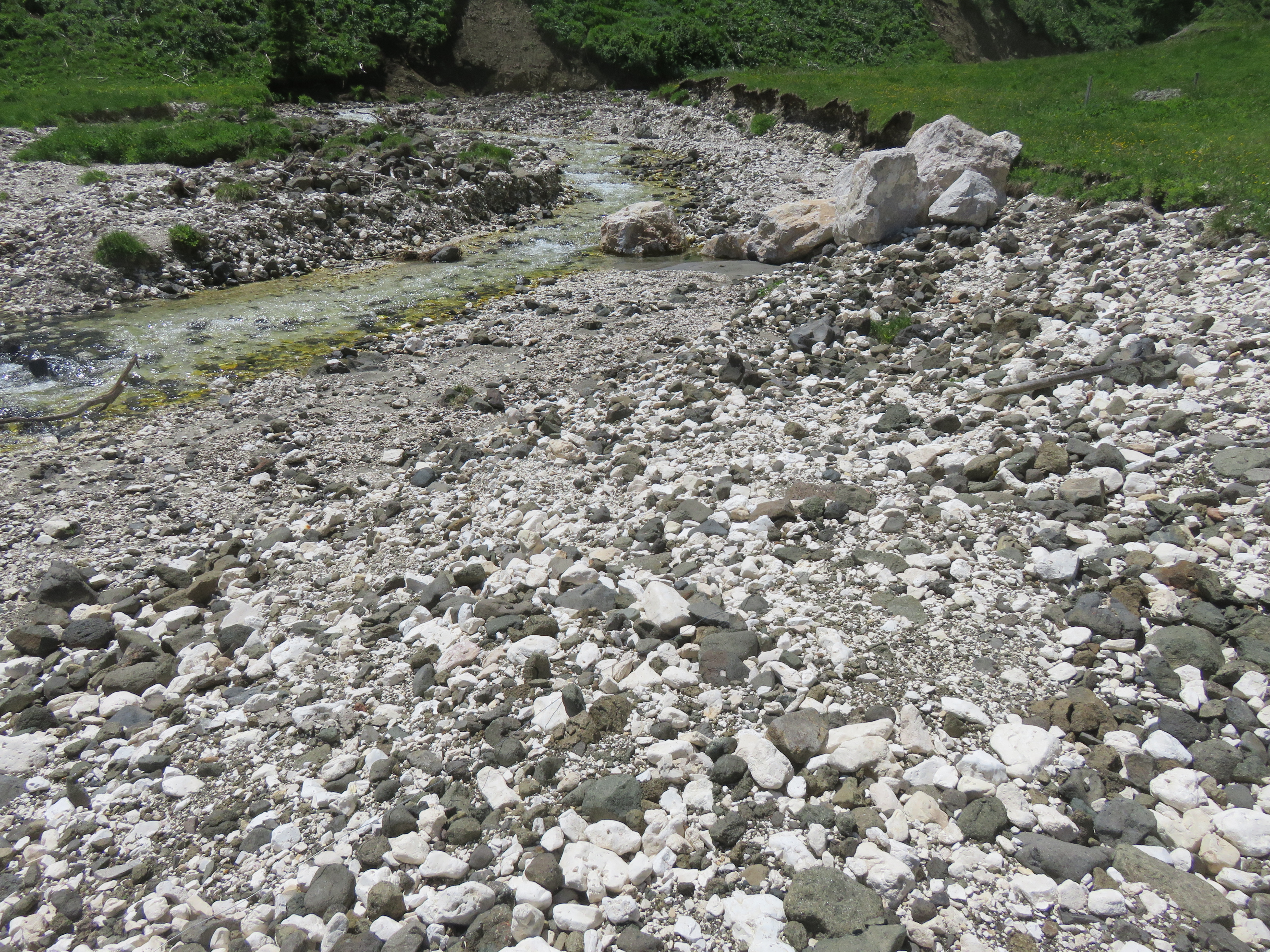 Il ruf de Duron, o rio di Duron, è il torrente della val Duron, affluente dell'Avisio nel quale confluisce all'altezza di Campitello di Fassa.